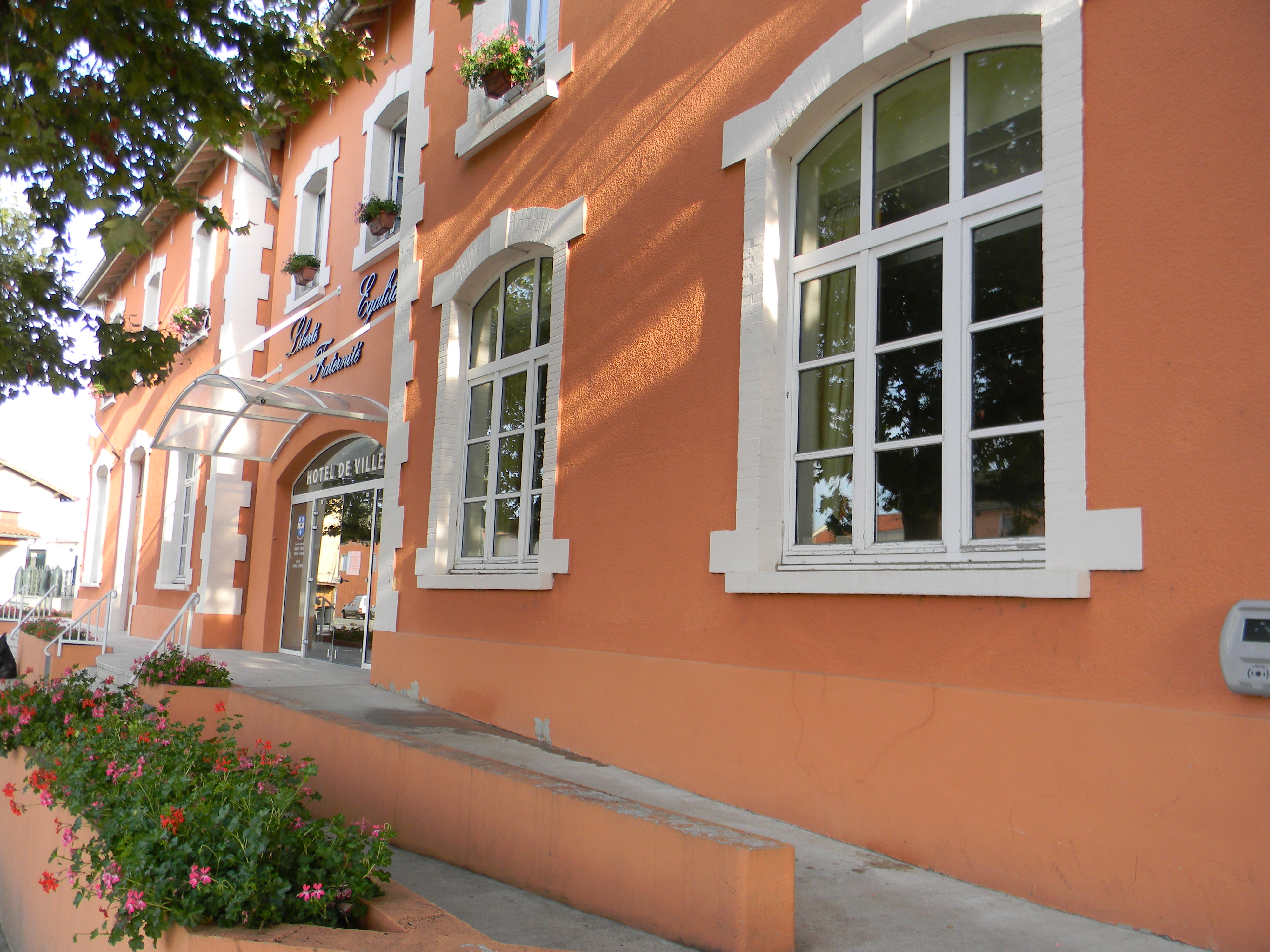 Hôtel de ville de Jonage.